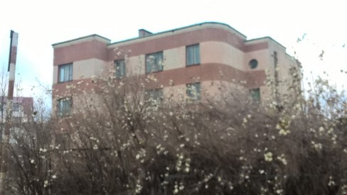 Zwardoń, budynek po byłej Strażnicy Wojsk Ochrony Pogranicza Zwardoń (WOP), od 16 maja 1991 roku Strażnica Straży Granicznej w Zwardoniu do 3 stycznia 2003 roku.